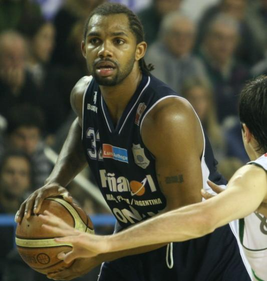 El jugador de básquetbol David Jackson jugando para Peñarol de Mar del Plata